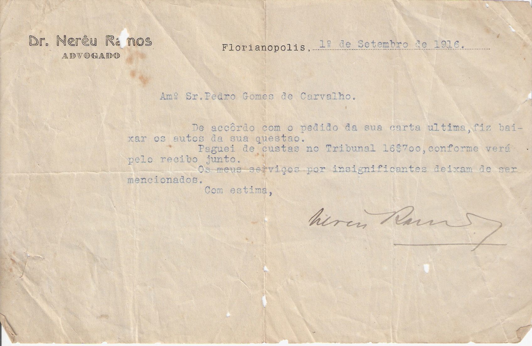 Correspondência datilografada do advogado Nereu Ramos com seu cliente Pedro Gomes de Carvalho, 1 de setembro de 1916. Escaneado do documento original.